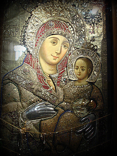 Obraz Matki Bożej z Dzieciątkiem w bazylice Narodzenia Pańskiego w Betlejem(2007)